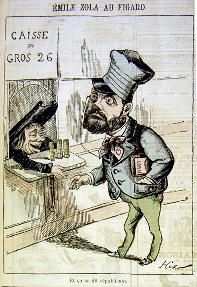 Zola au Figaro - 1877